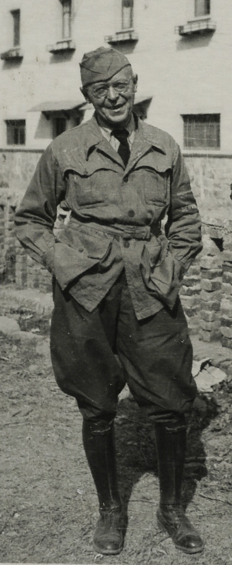 Władysław Dziewanowski